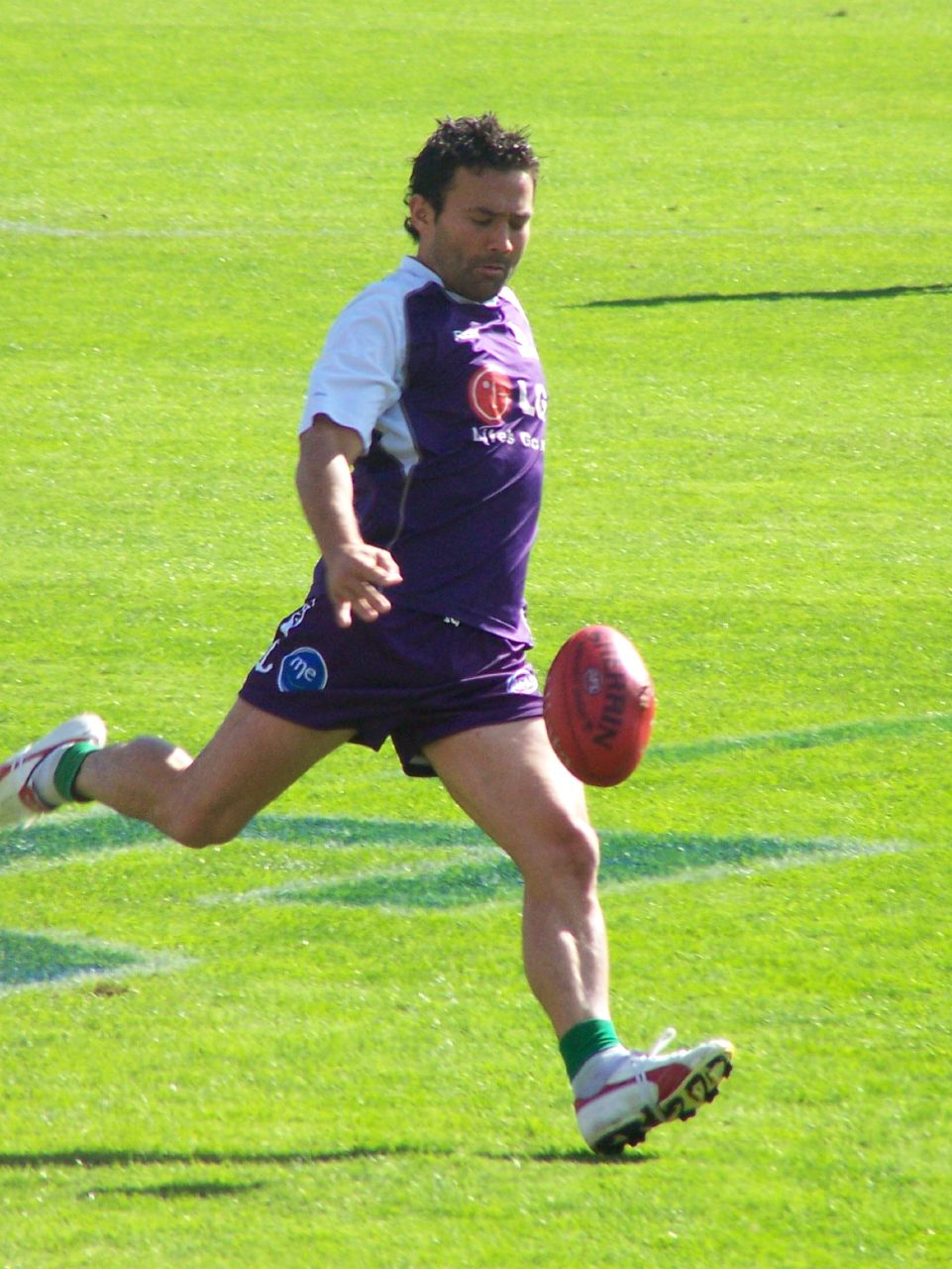 Fremantle Docker's Peter Bell warming up